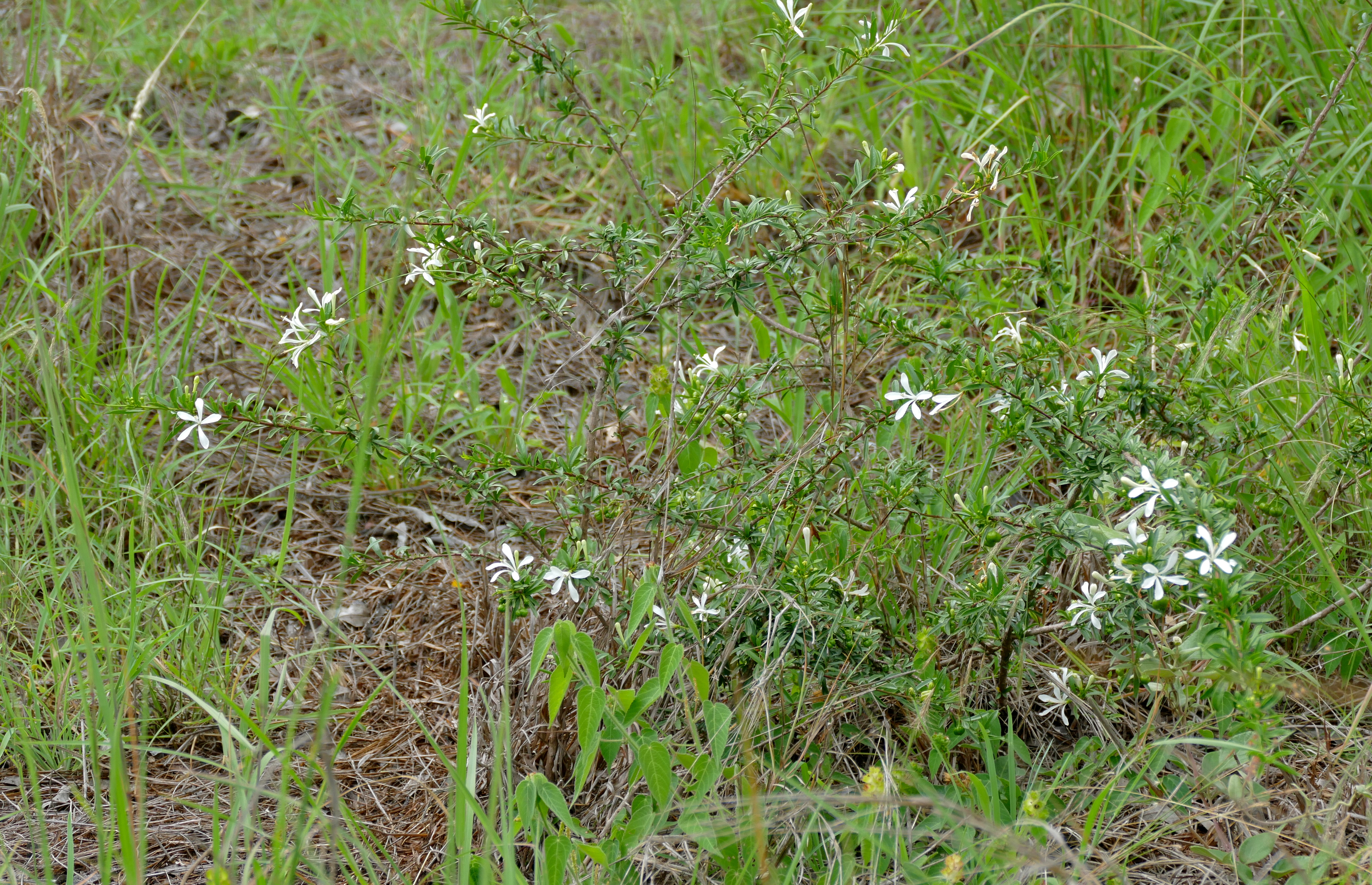 S139 Road West of Biyamiti, Kruger NP, SOUTH AFRICA